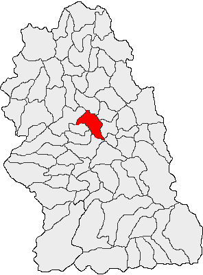 Categorie:Hărţi ale judeţului Hunedoara